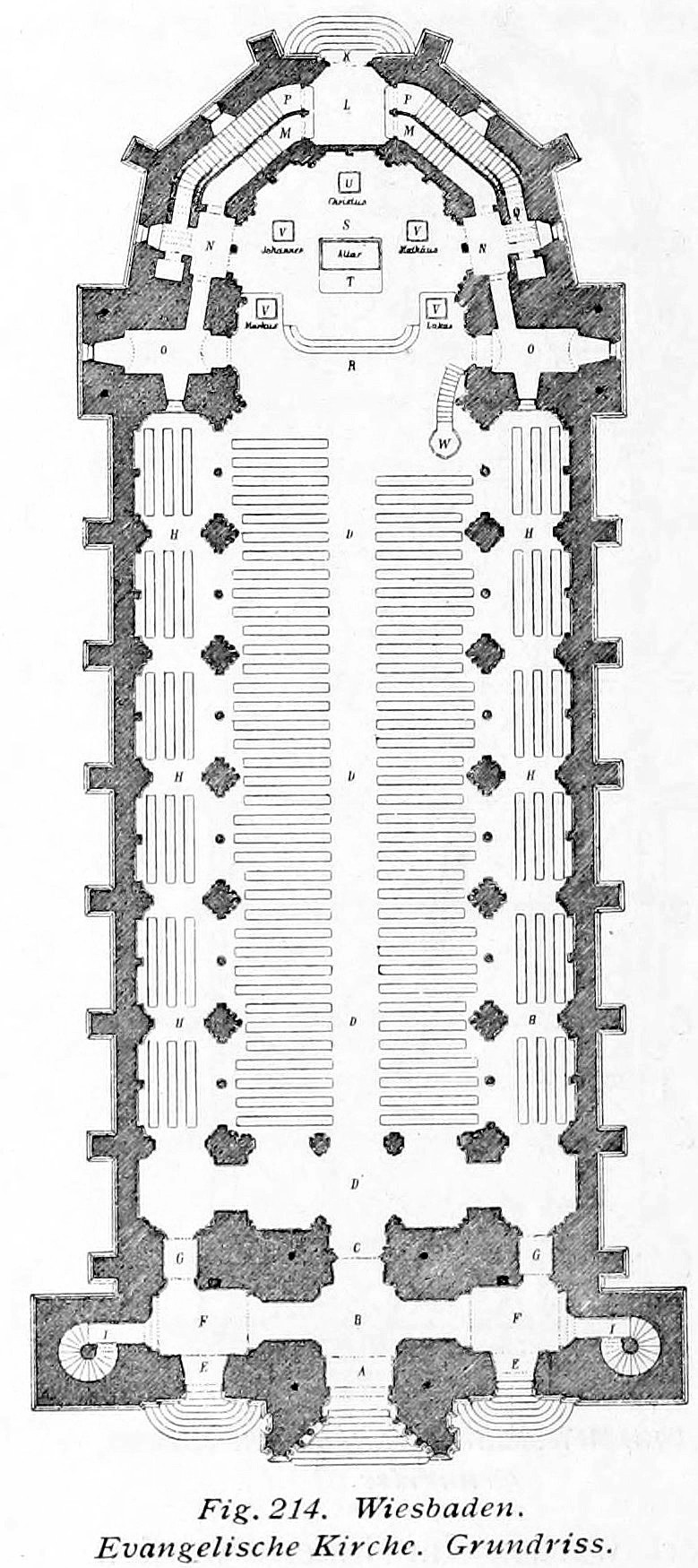 Wiesbaden evangelische Kirche Grundriss